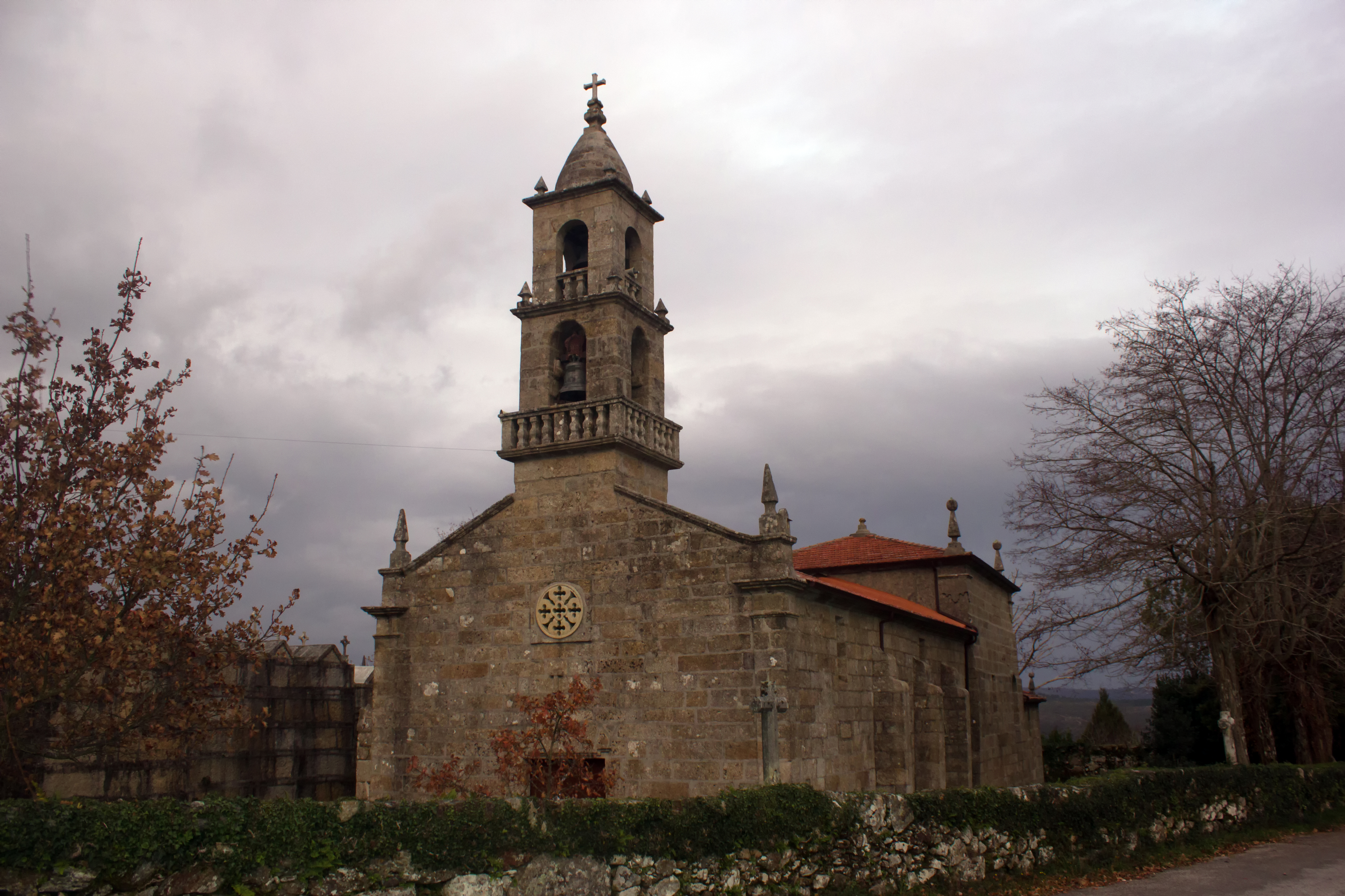 Igrexa de Amiudal, no concello de Avión.